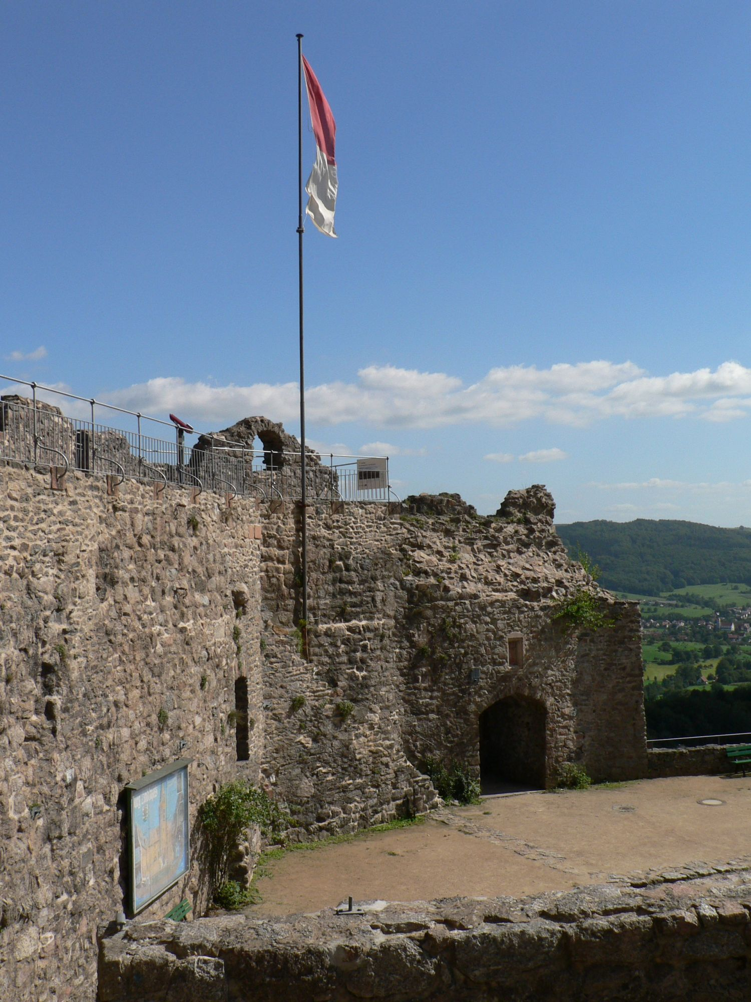 Ostseite (innen) von Burg Lindenfels